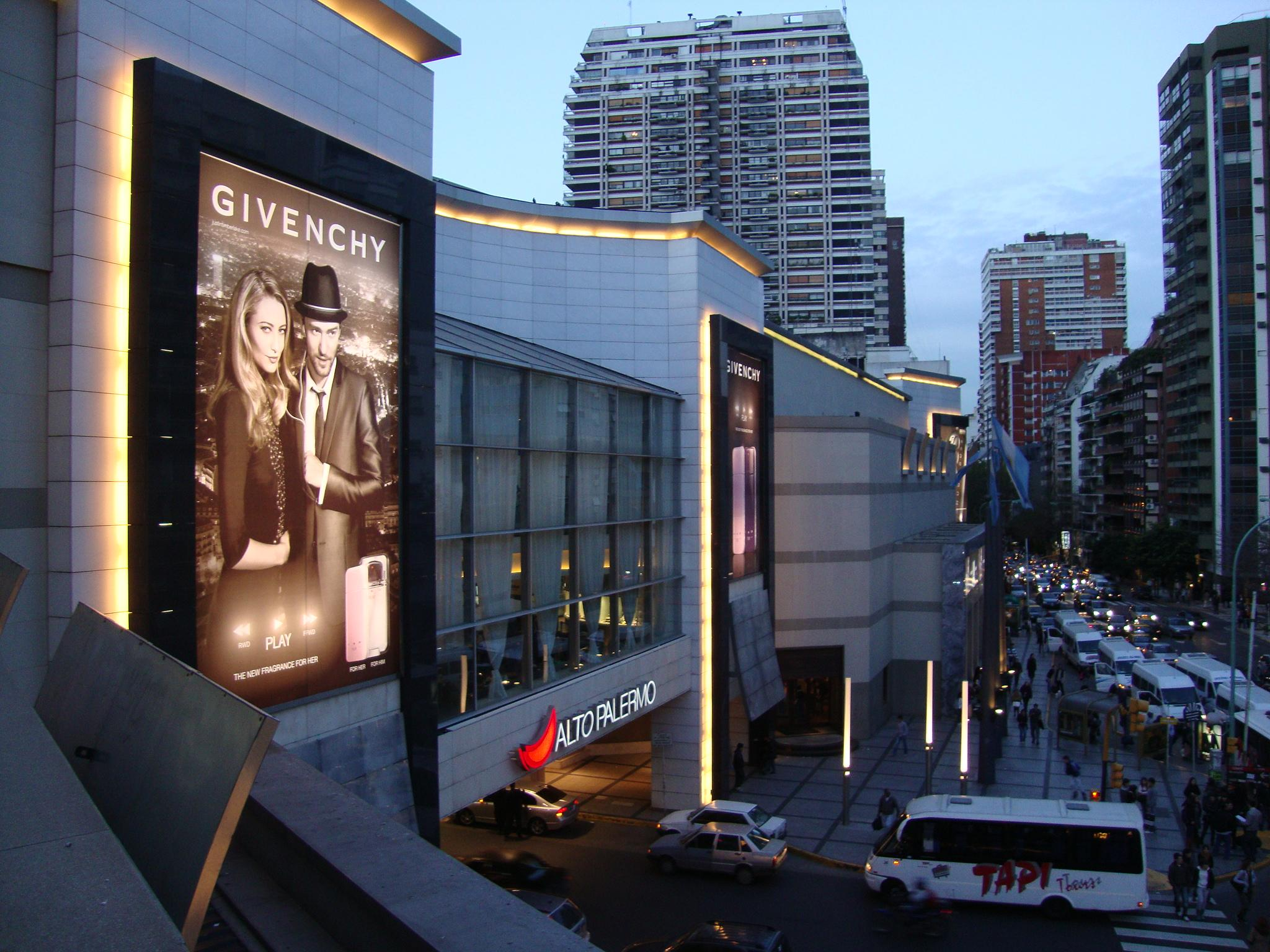 Vista de la Av. Coronel Díaz desde el patio de comidas del centro comercial Alto Palermo. Se ve parte de la fachada del mismo, y su iluminación nocturna.